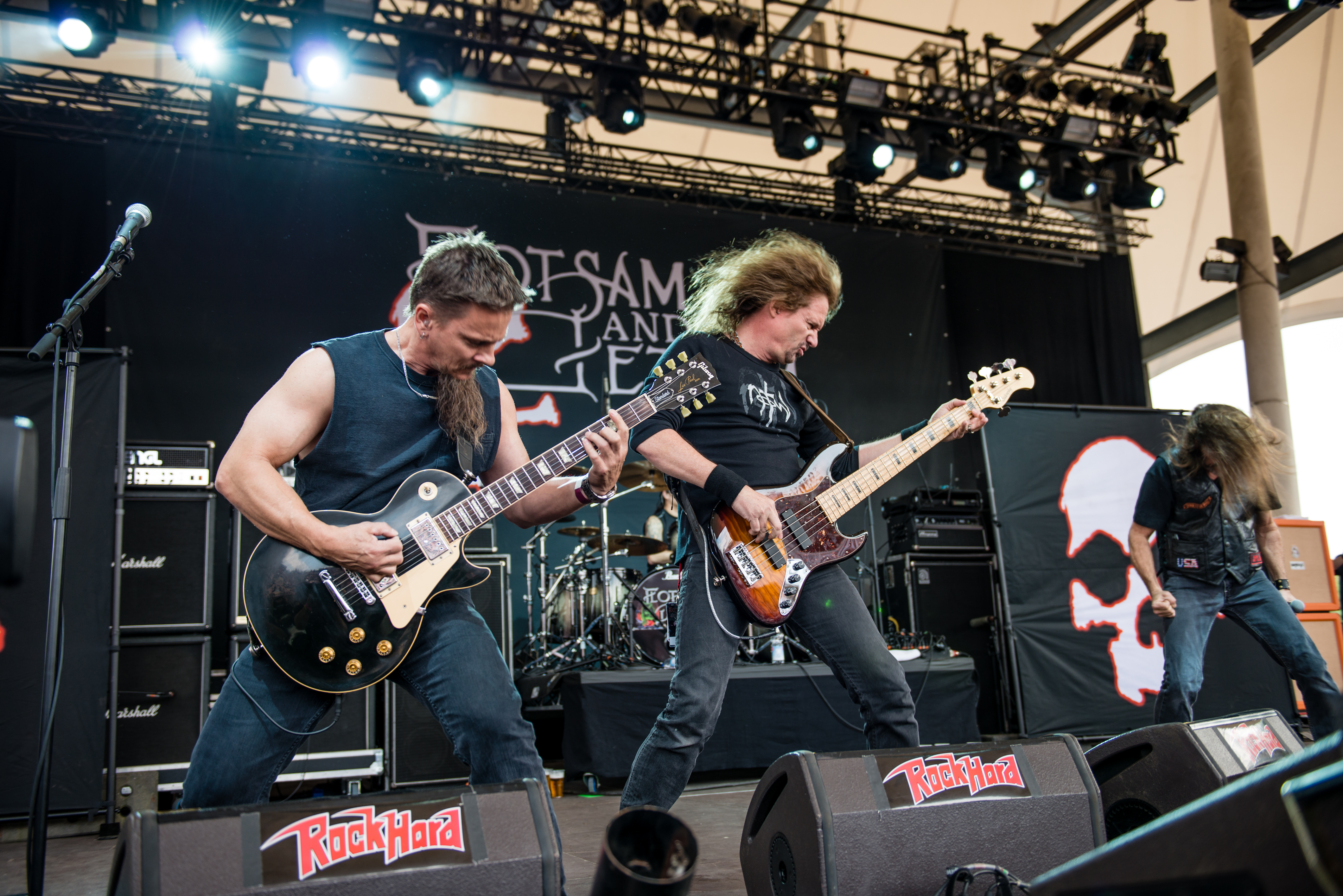 'Rock Hard Festival 2015; Gelsenkirchen Amphitheater': 'Flotsam and Jetsam'